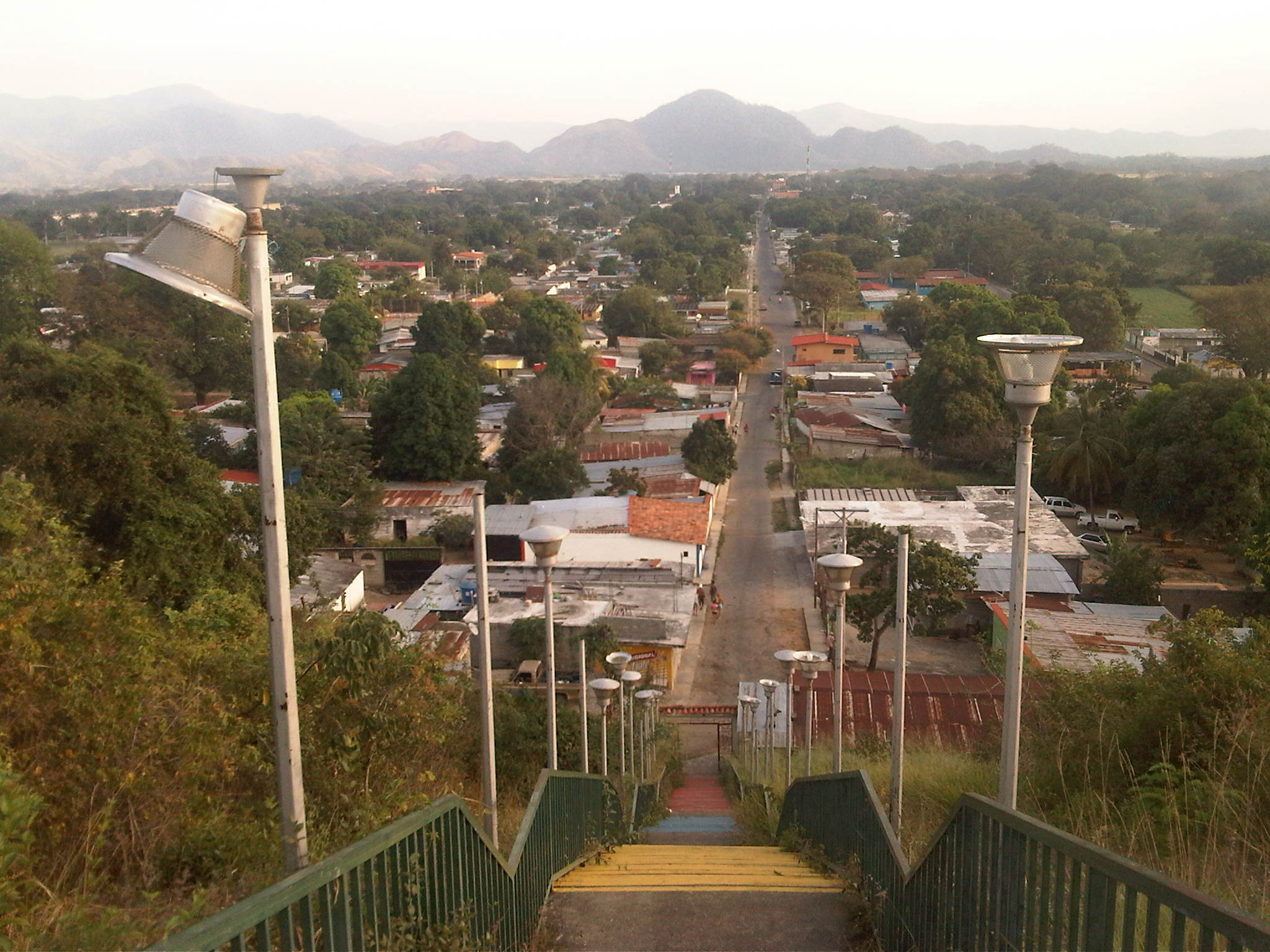 El mirador turistico de sarare, o mas comúnmente llamado El Mirador Las Tres Cruces.